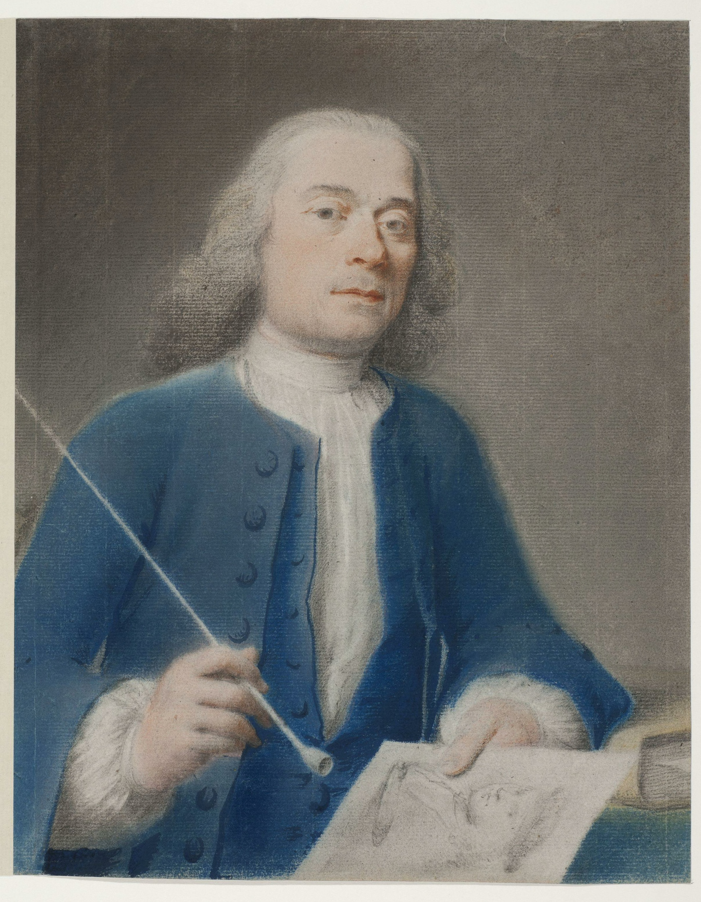 Self-portrait